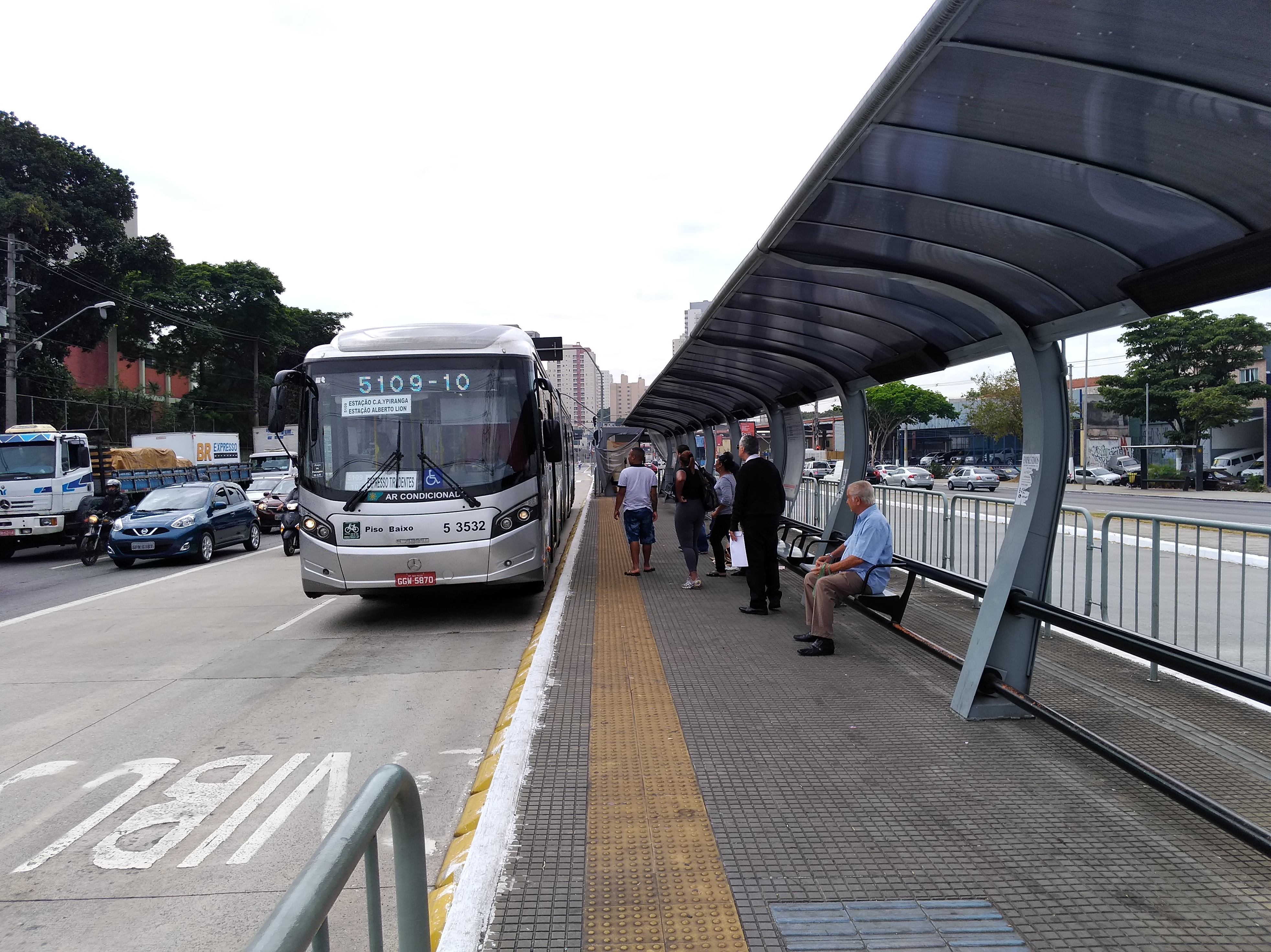 Parada Dianópolis do BRT Expresso Tiradentes, no distrito da Vila Prudente.